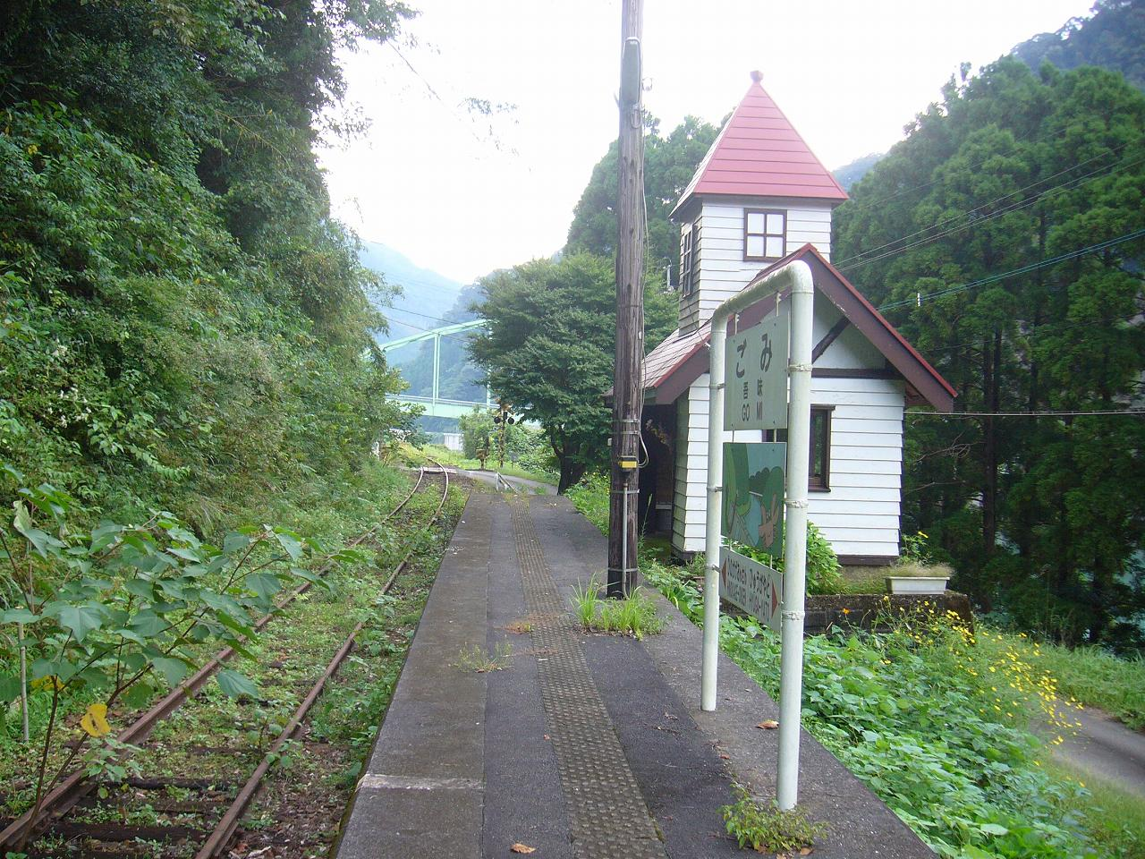 Gomi Station in Takachiho Line in Miyazaki, Japan